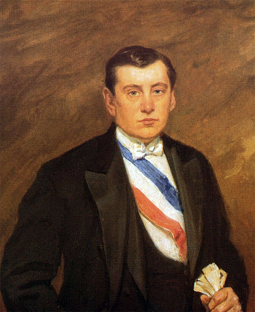 Arturo Alessandri Palma. Presidente de Chile en dos periodos (1920-1925 y 1932-1938)